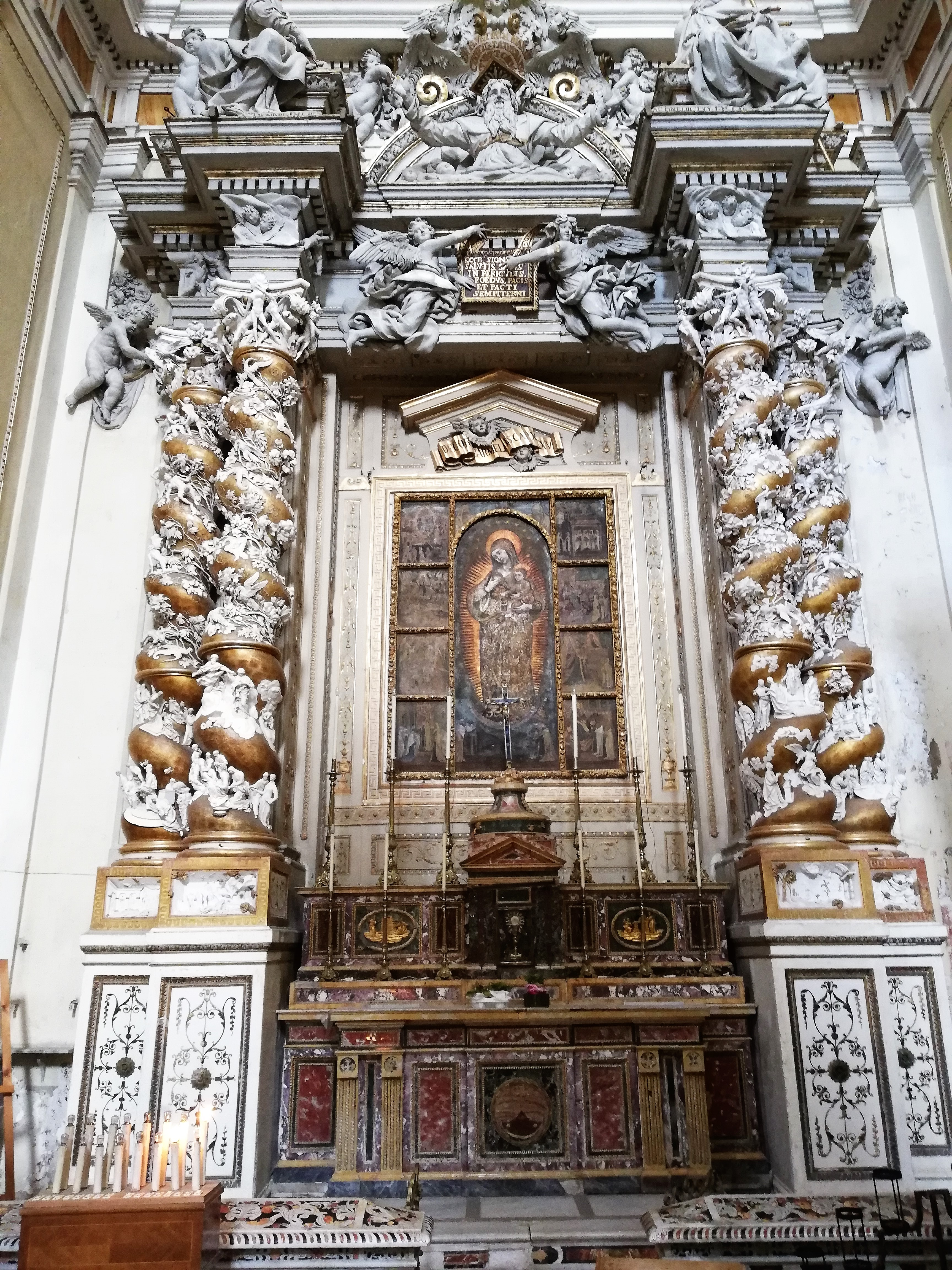 Transetto sinistro: Cappella della Madonna del Carmine.